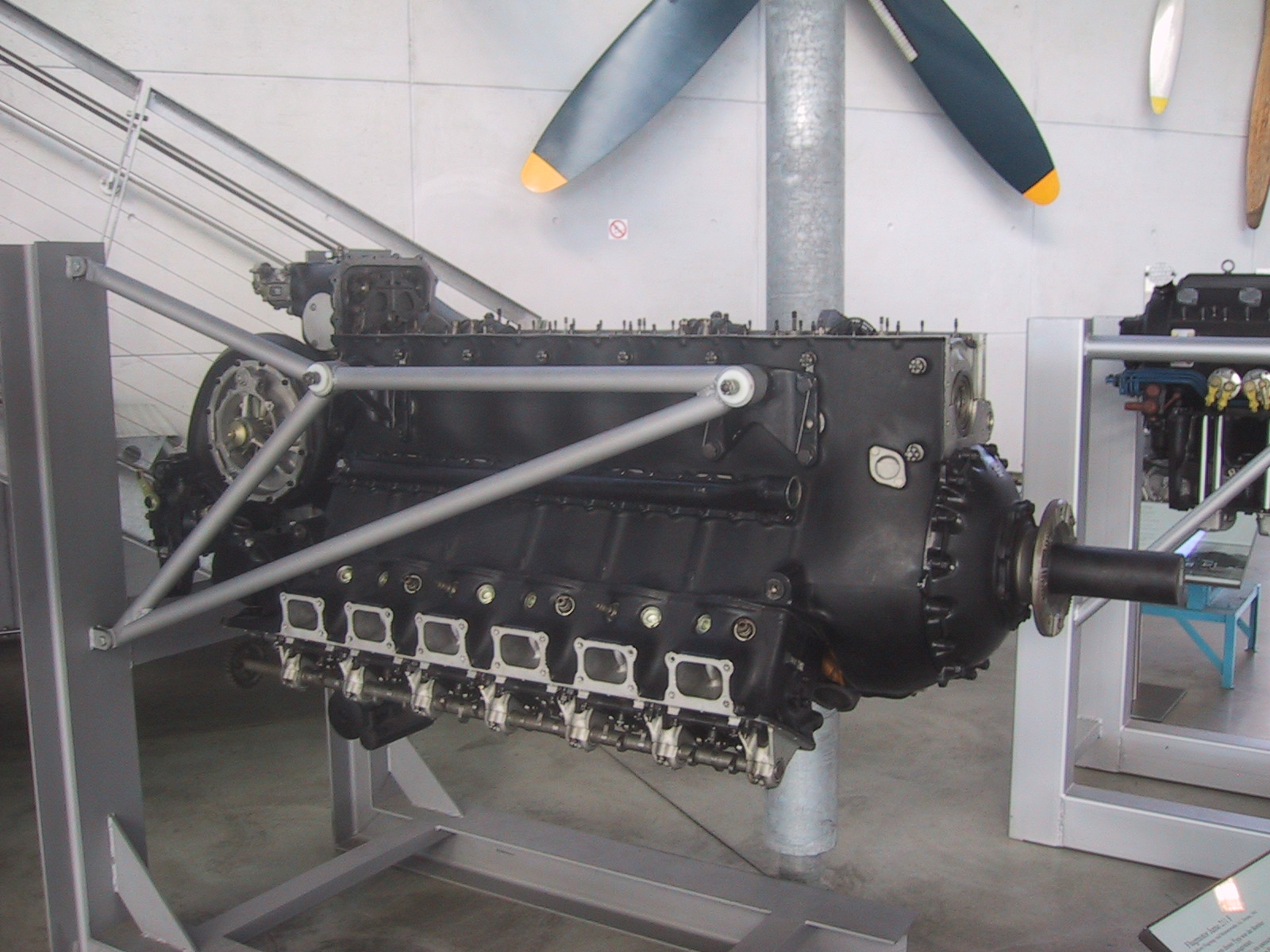 Jumo 211 F Aircraft Engine, Deutches Museum